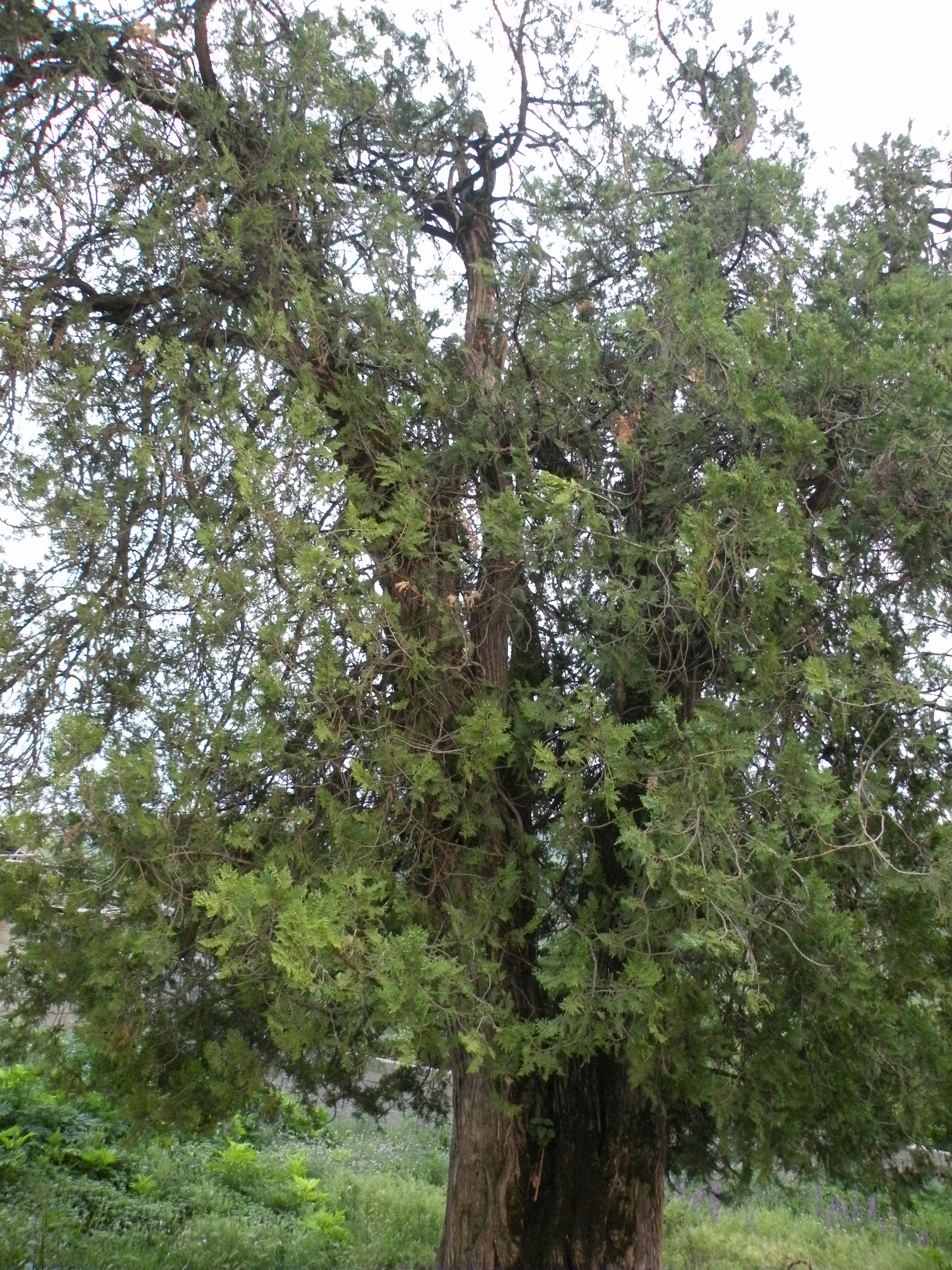 درخت اورس سودکلا